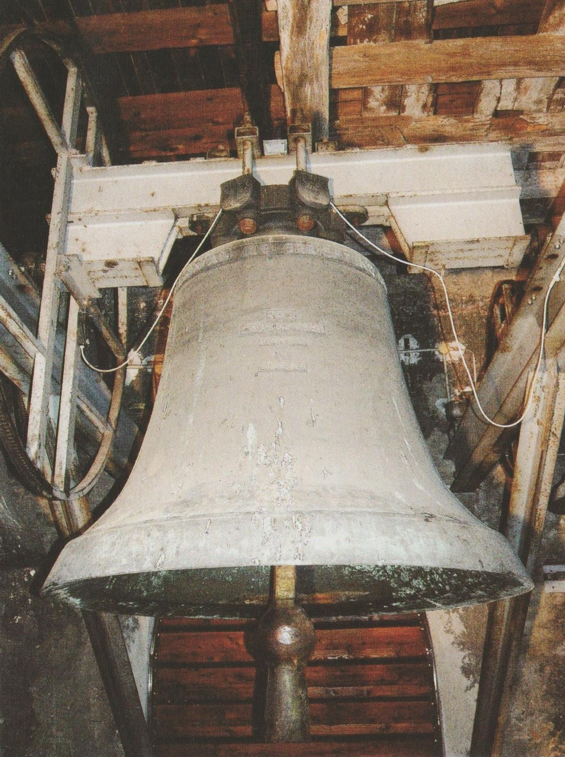 Glocke 1 - Bischhofsglocke